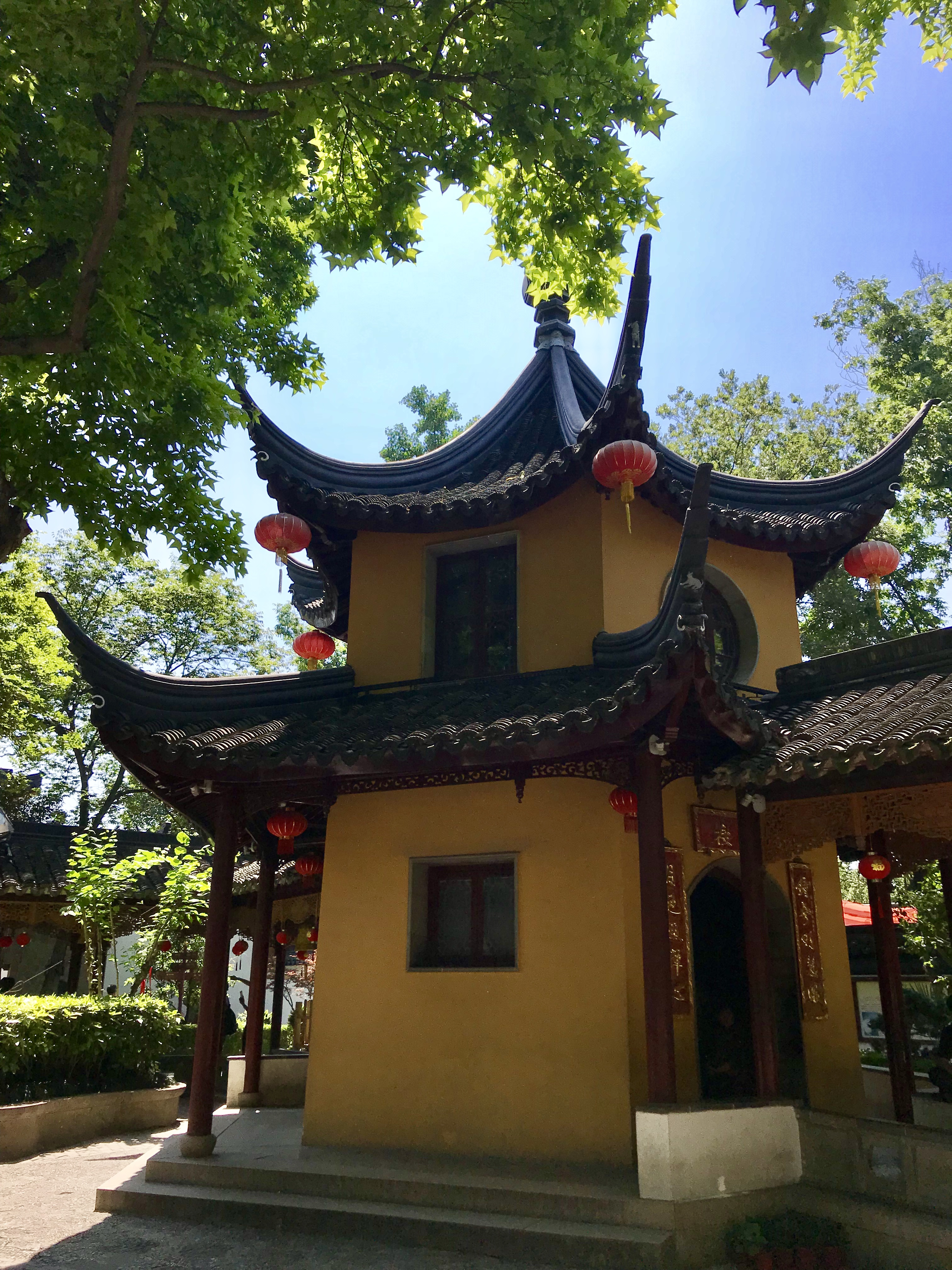 中文（台灣）: 寒山寺鐘樓